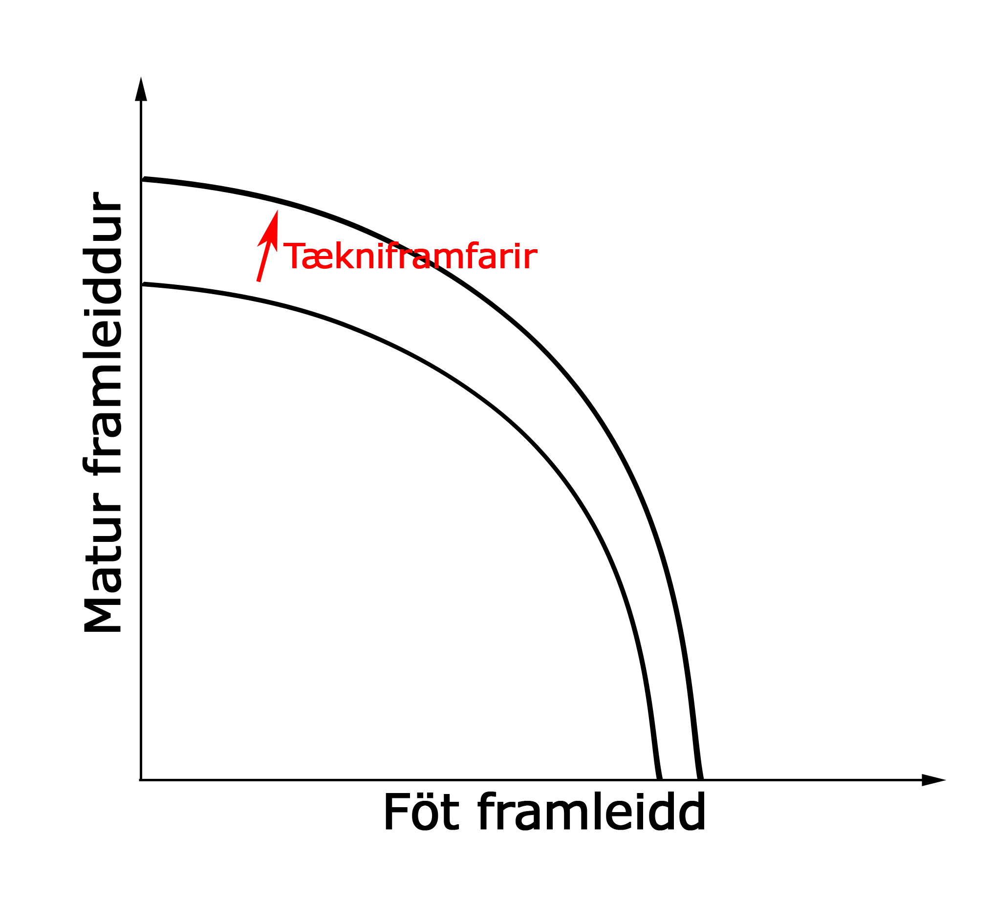 Útvíkkun framleiðslujaðars vegna tæknibreytinga